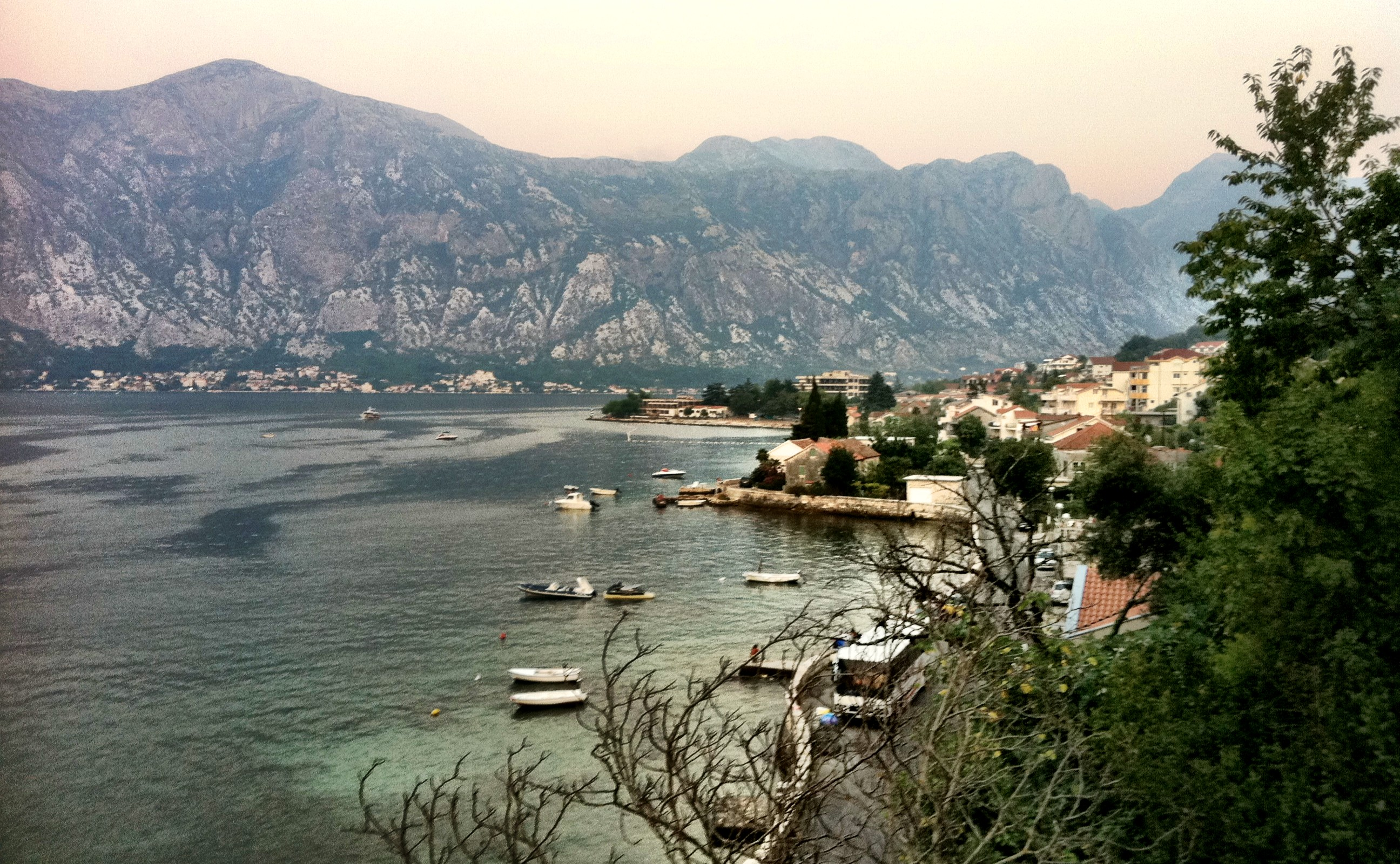 Stoliv, Montenegro